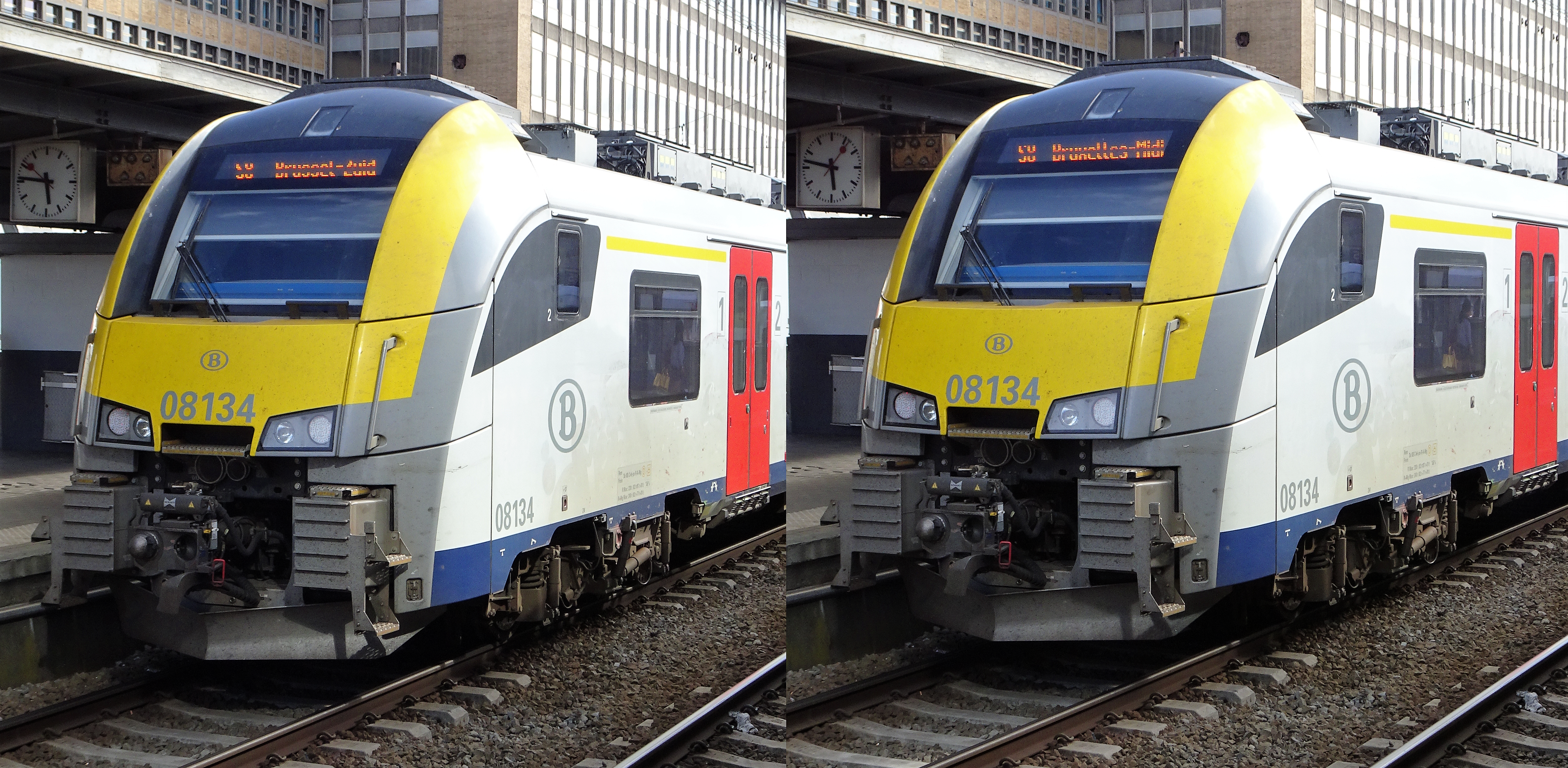 affichage électronique d'une AM 08 de la ligne S8 en gare de Bruxelles-Midi